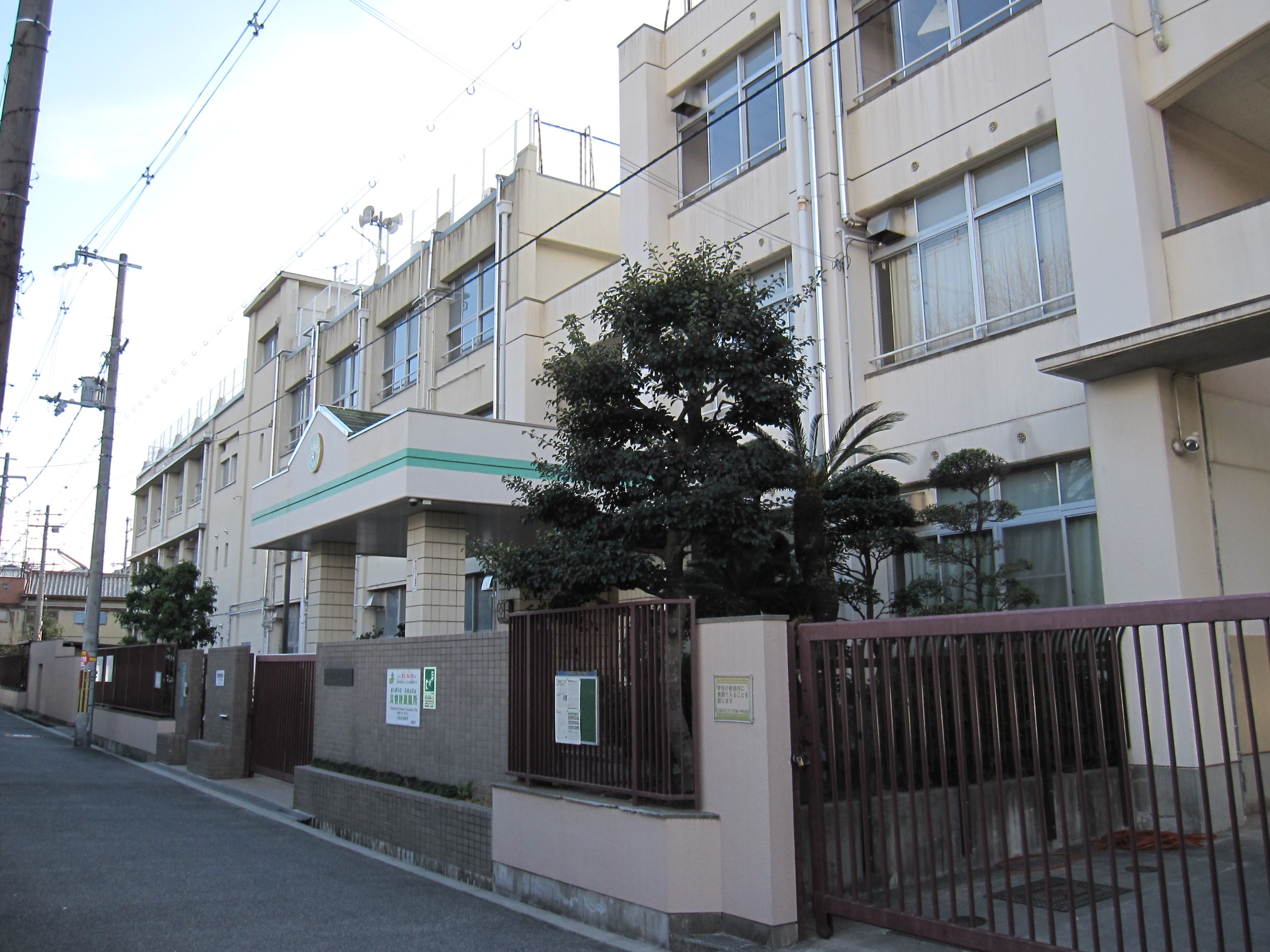 大阪市立天下茶屋小学校